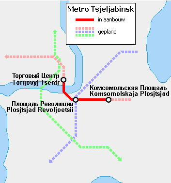 Kaart van de metro van Tsjeljabinsk